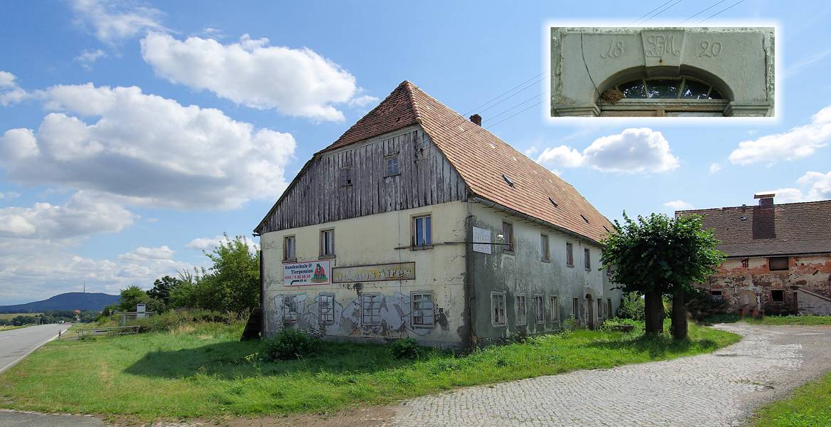 Ehemaliger Gasthof Buenos Aires Hornjoserbsce: Něhdyši Mikanec hosćenc "Buenos Aires" w Njeznarowach.